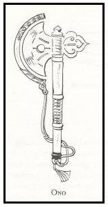 Medieval Japanese Axe